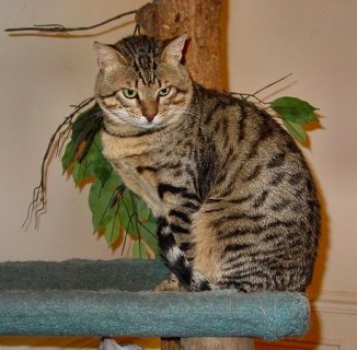 Maslama de fondcombe, dit l'égyptien, mau égyptien bronze Mis à disposition de Wikipédia par Didier Hallépée et l'Association Internationale du Mau Egyptien